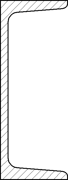 UNP-Profil selbst gezeichnet